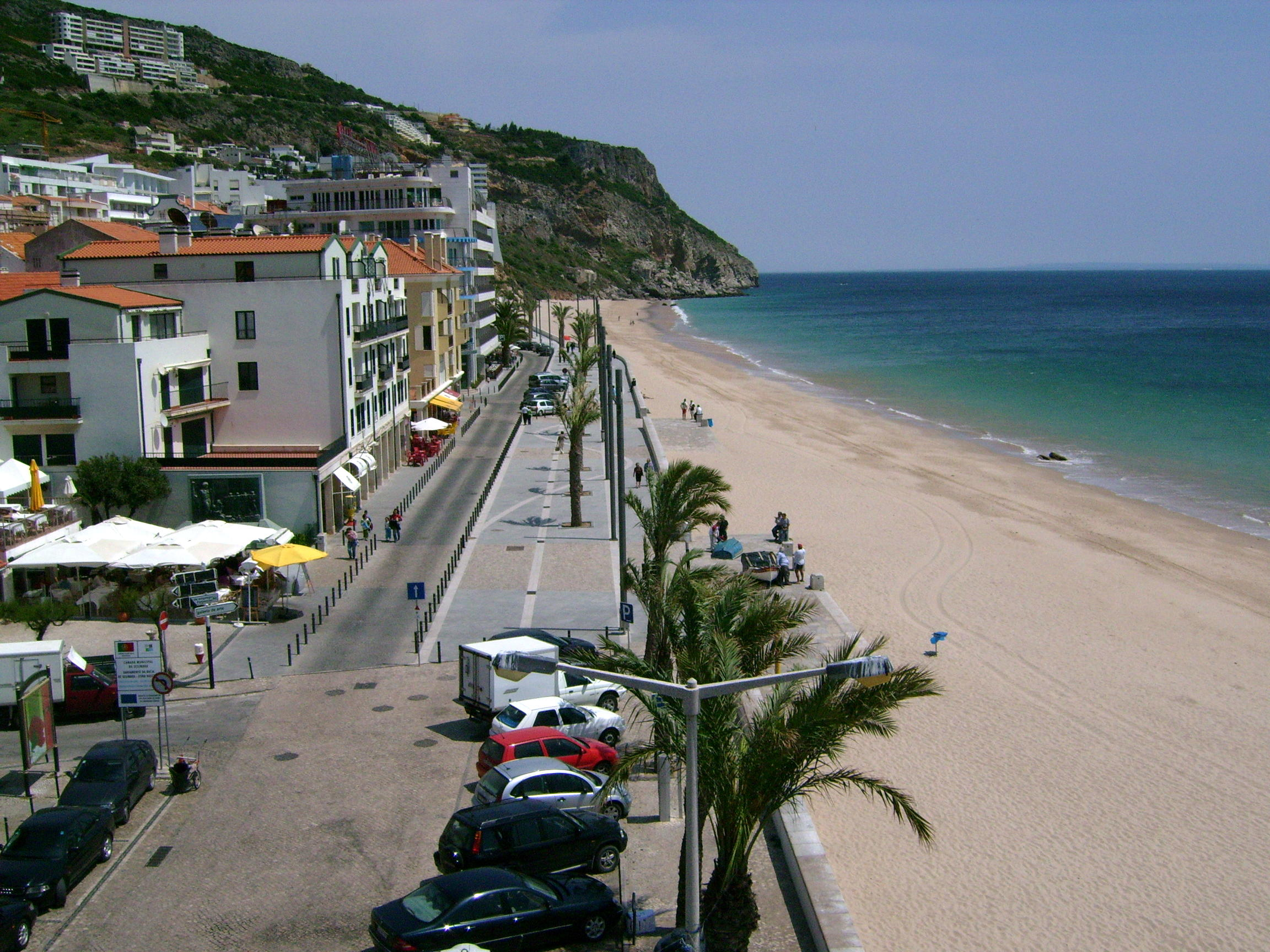 Parte da marginal de Sesimbra - Portugal marginal avenue of Sesimbra (beach) - Portugal user:sacavem